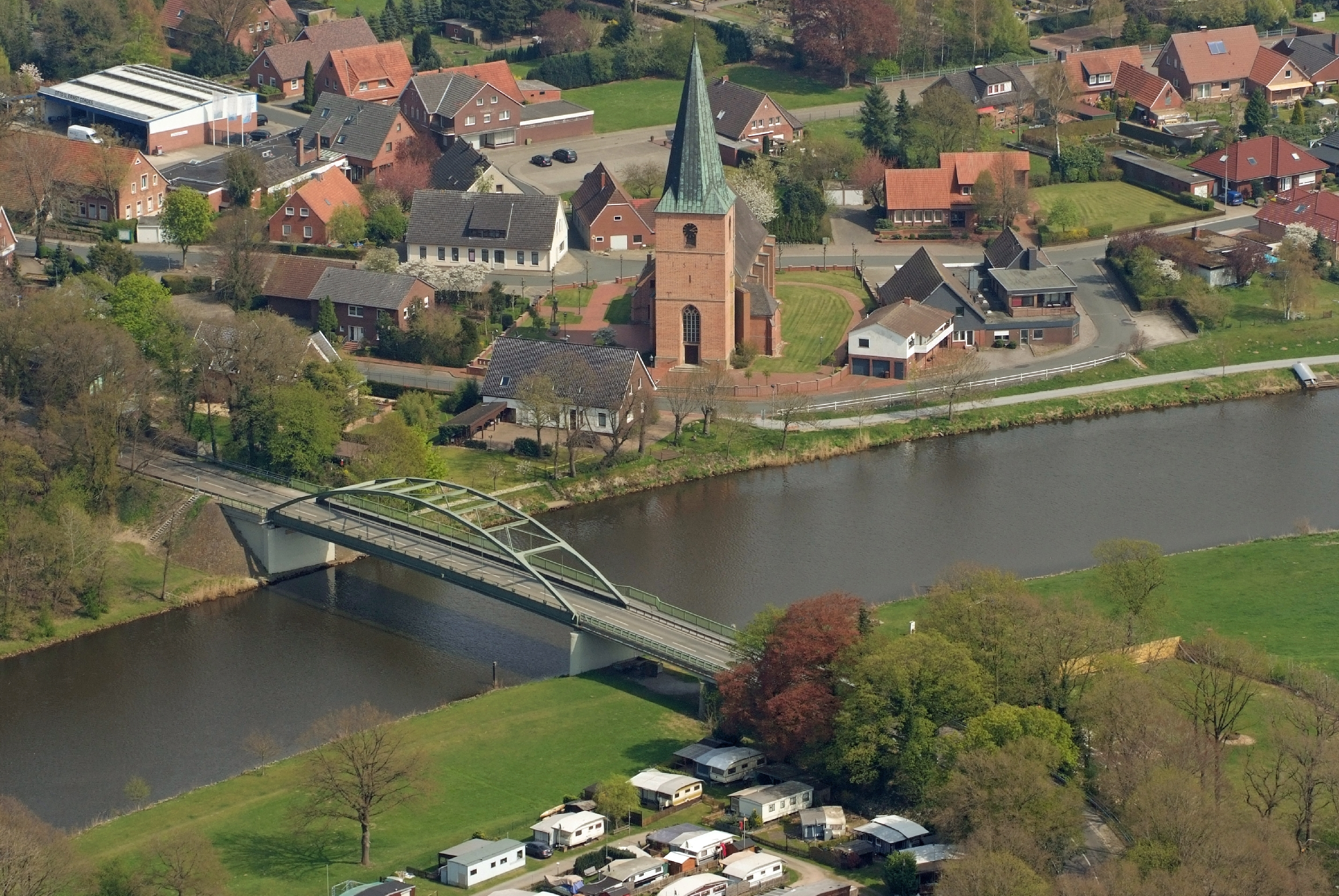 Fotoflug von Nordholz-Spieka nach Oldenburg und Papenburg